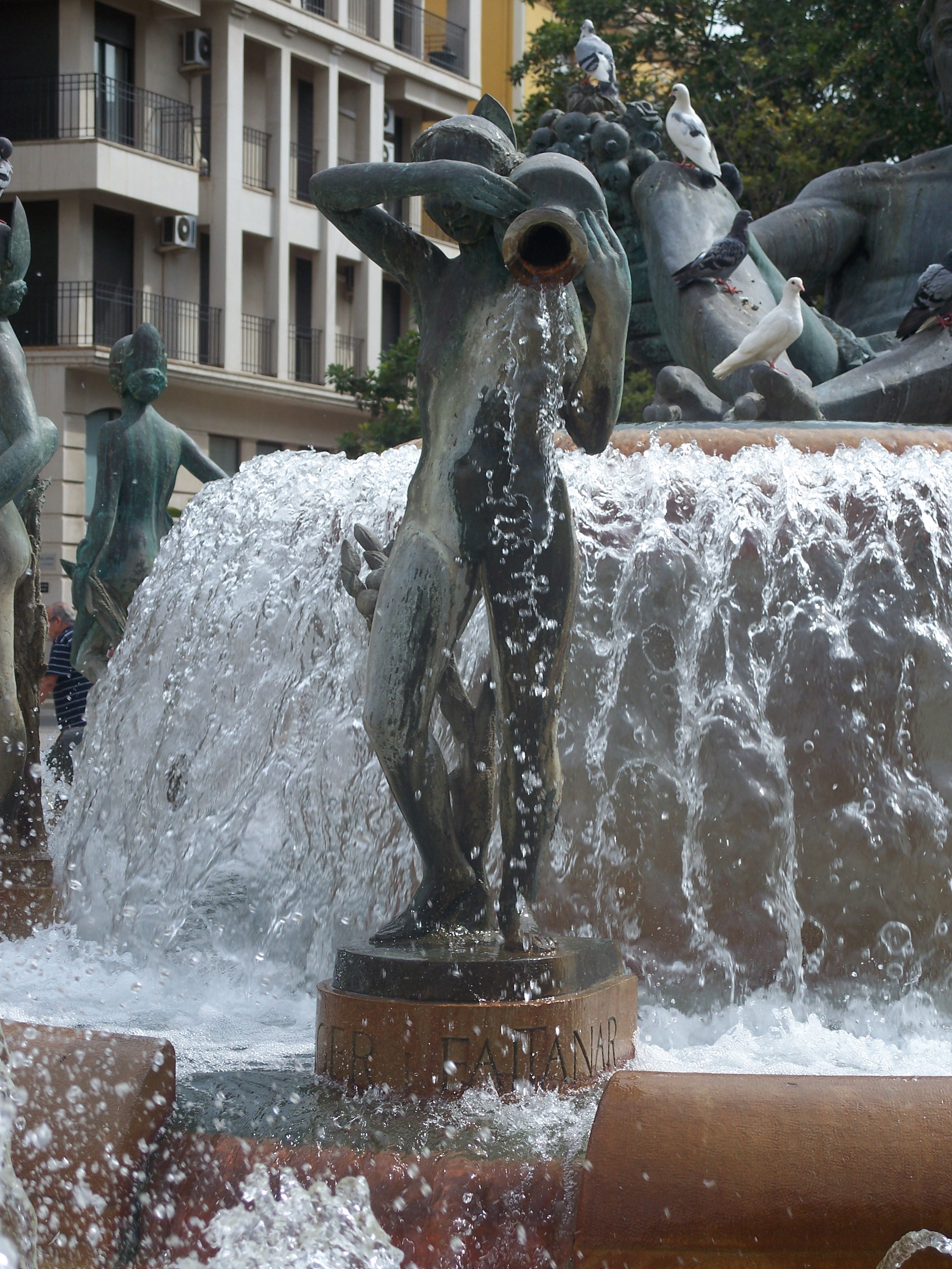 Alegoria_Sequies_Túria_(Benàger-Faitanar)_València.